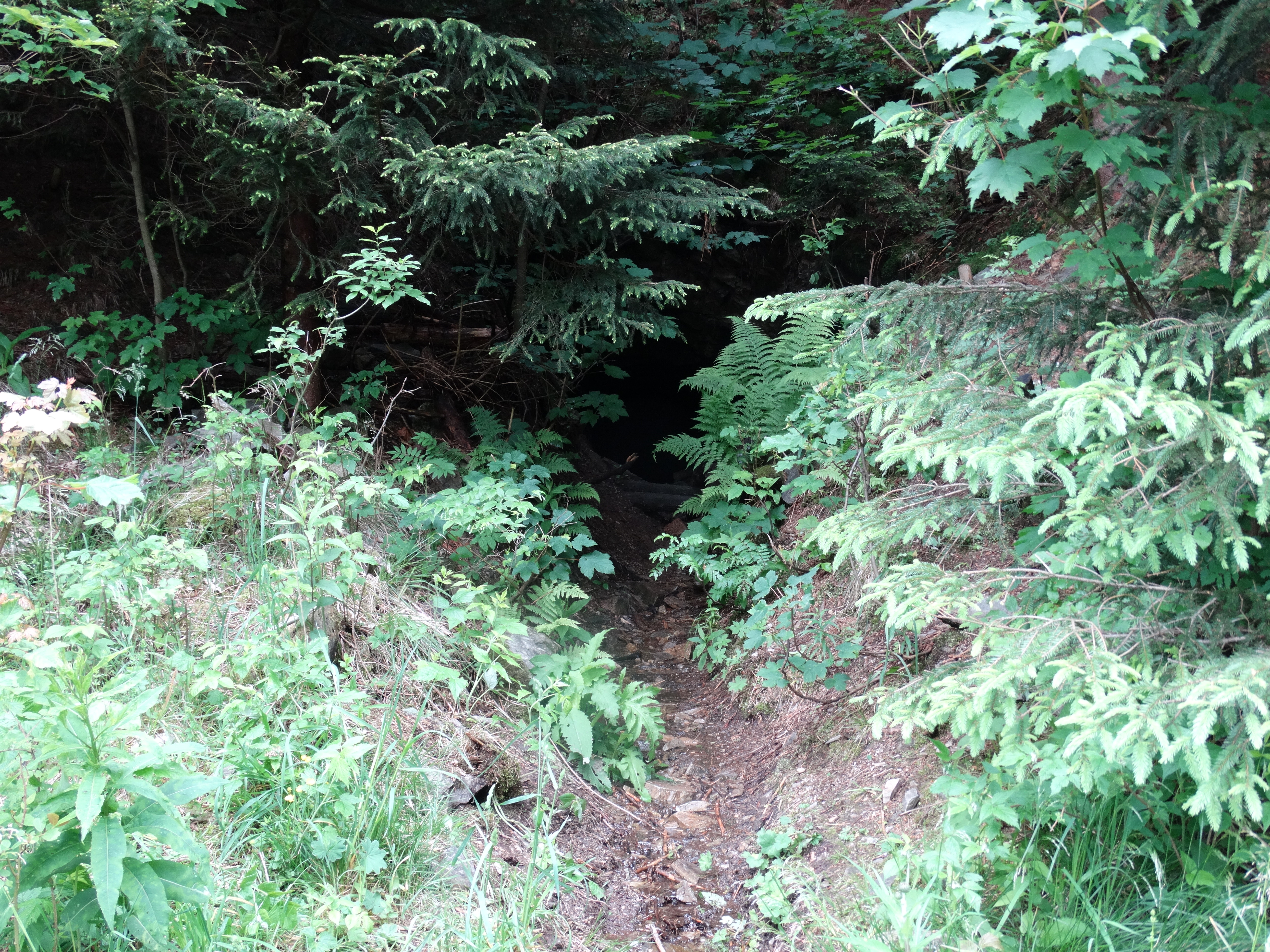 Sztolnia w Budnikach